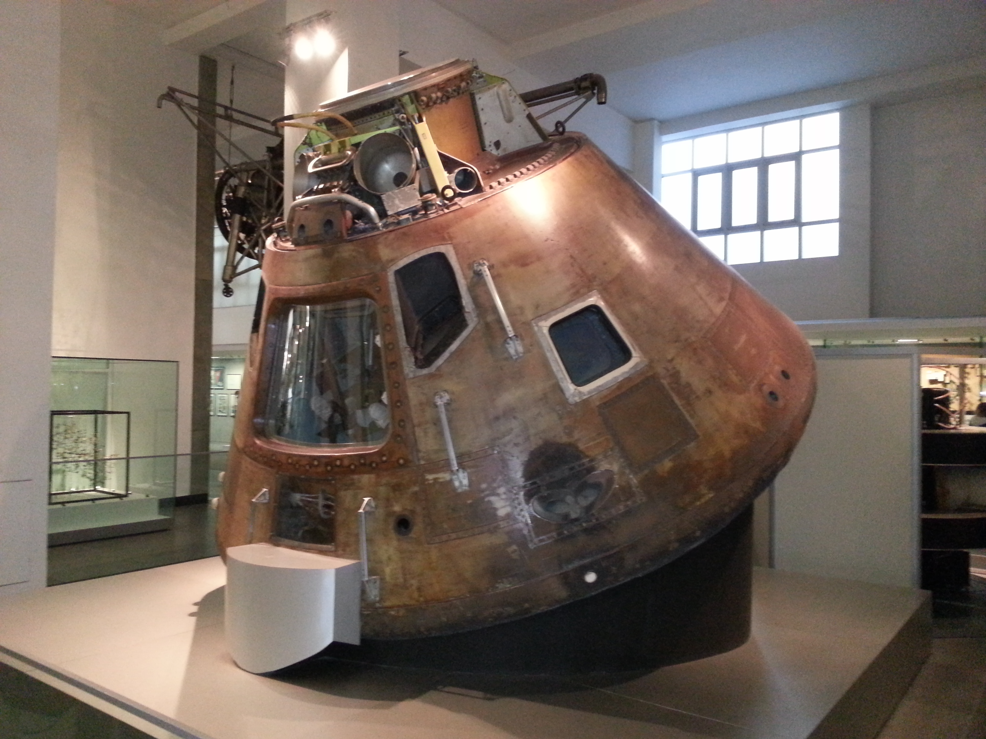 Aufnahme des Command Module der Mission Apollo 10, ausgestellt im Science Museum in London.